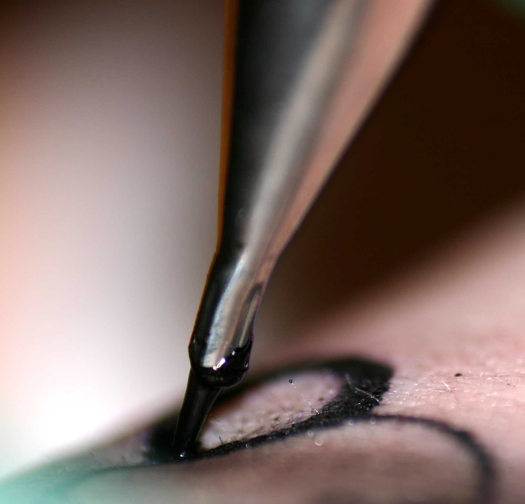 Tattoo needle